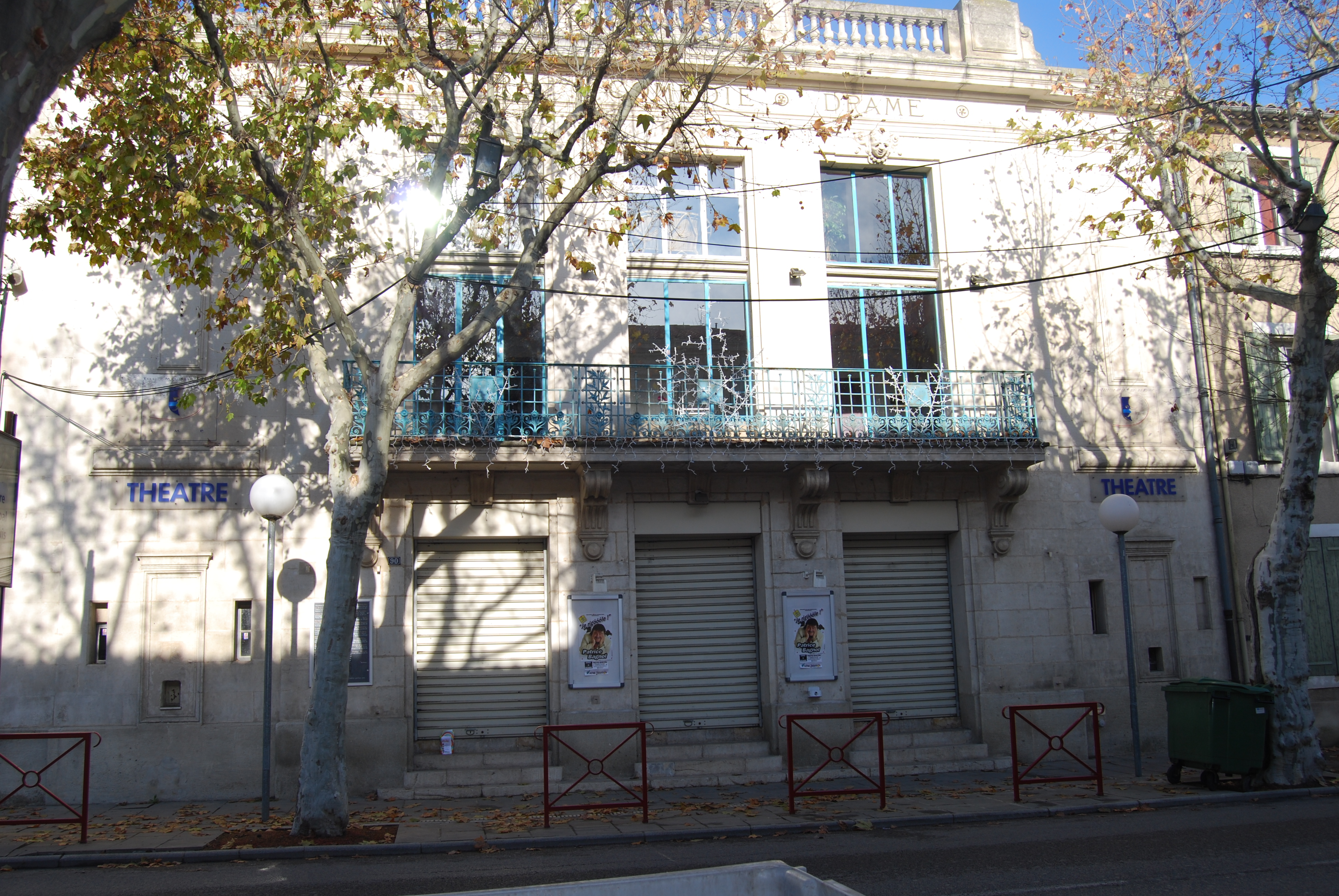 Théâtre de Pertuis